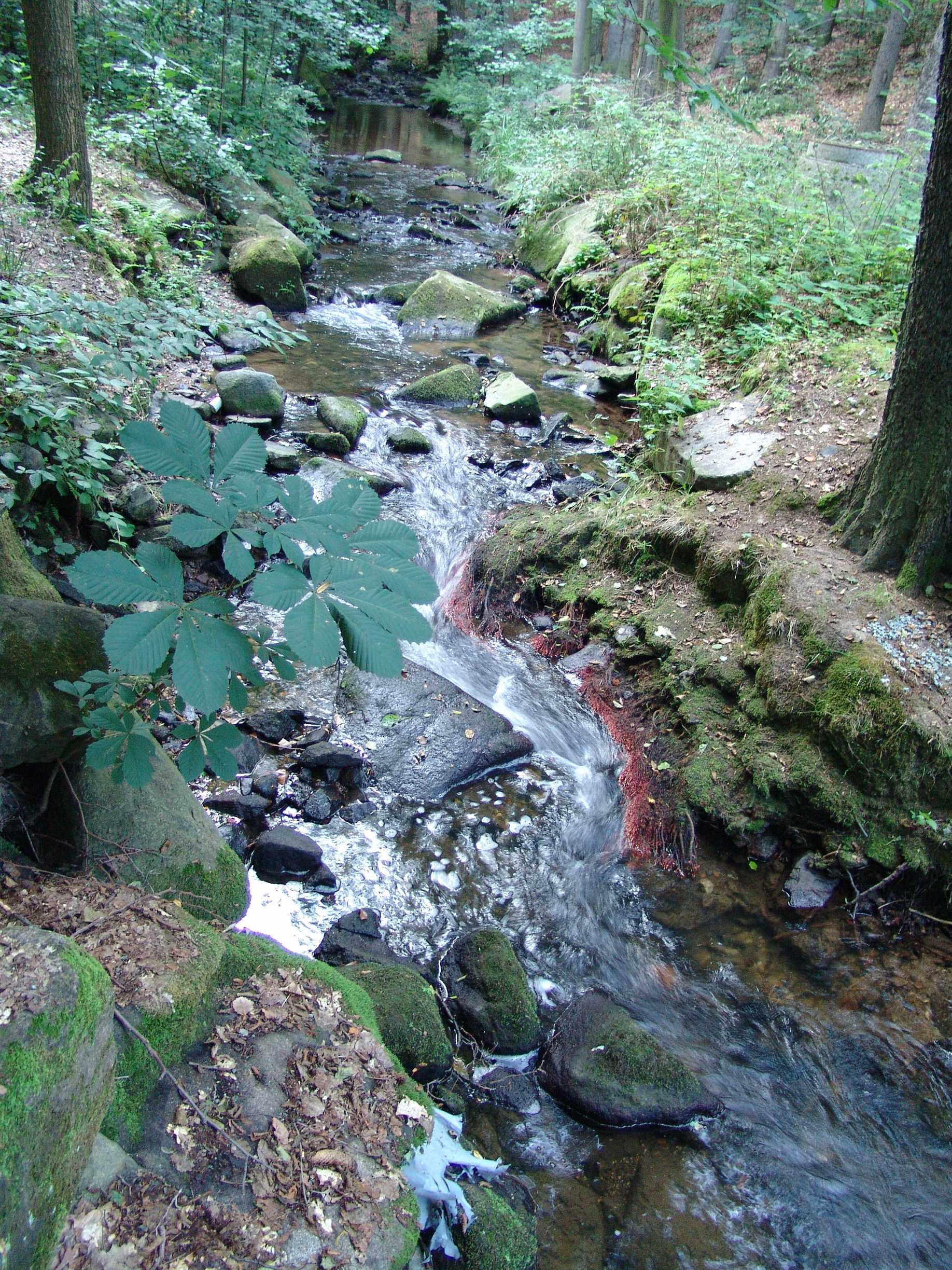 Dürrhennersdorfer Wasser